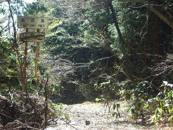 旧国道181号四十曲峠旧道